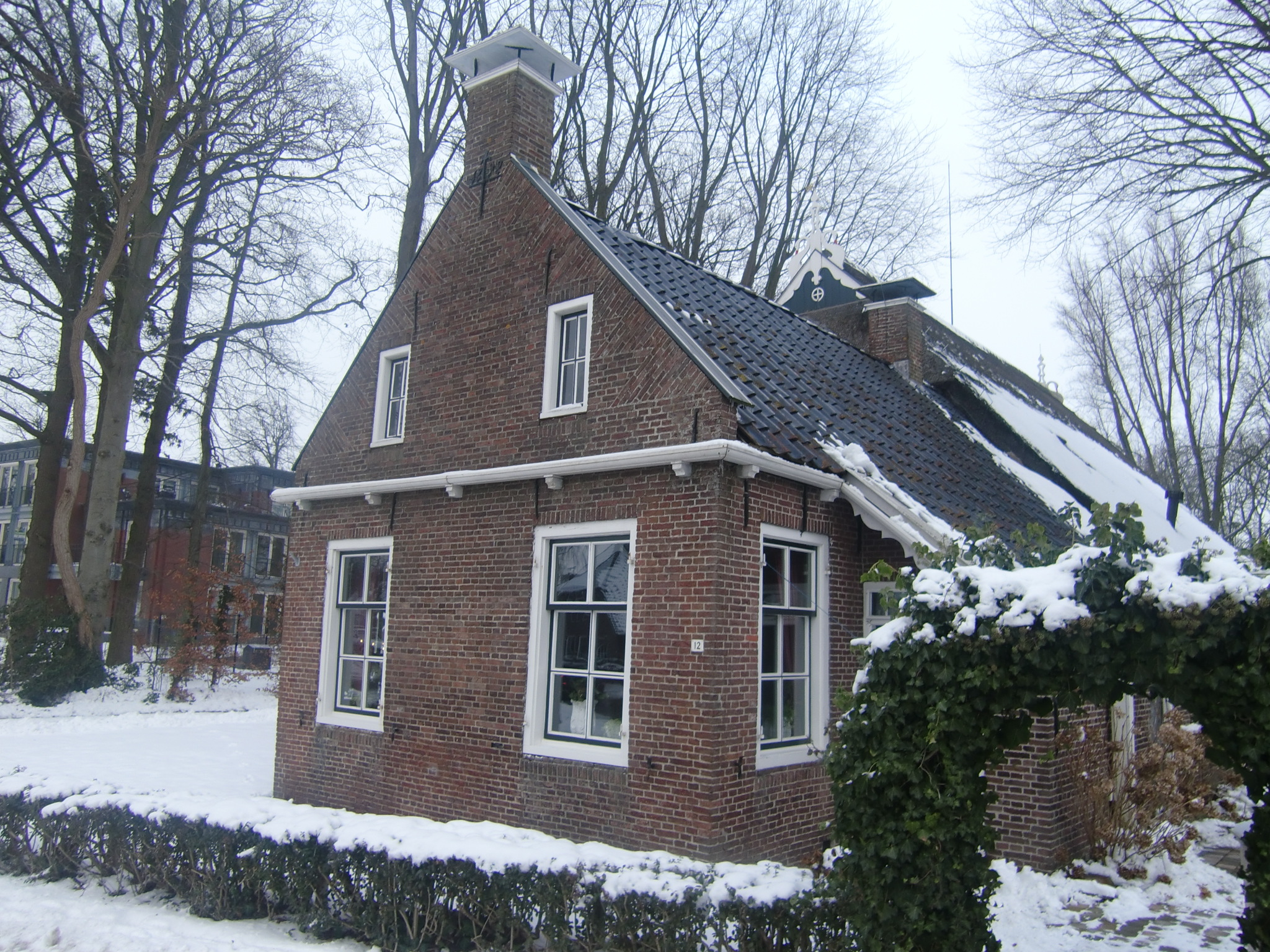 Kop-rompboerderij met zesruitsvenster in het woongedeelte en in de top. Bouwjaar: 1792